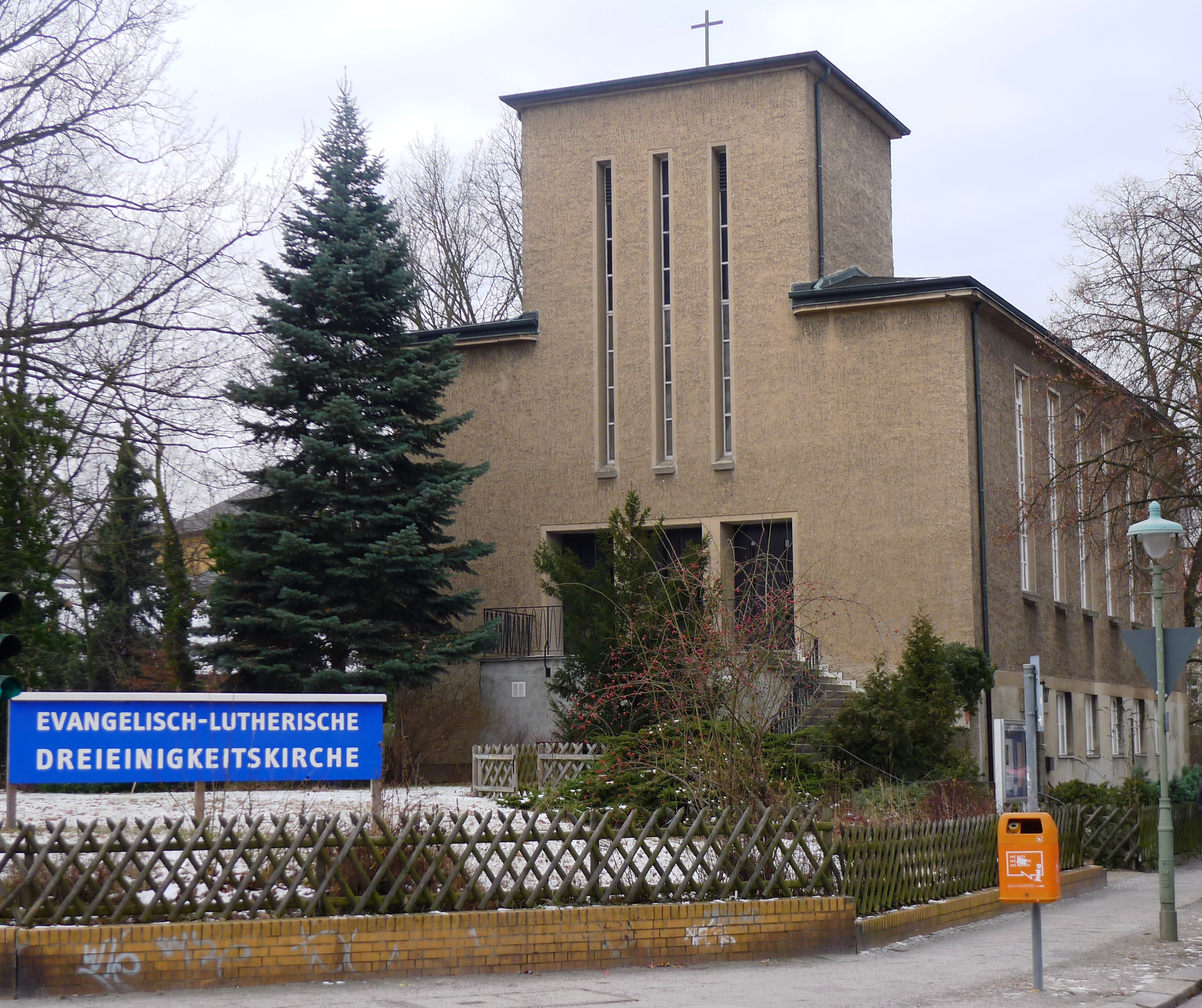 Blick auf die Kirche von der Filandastraße Ecke Südendstraße aus.